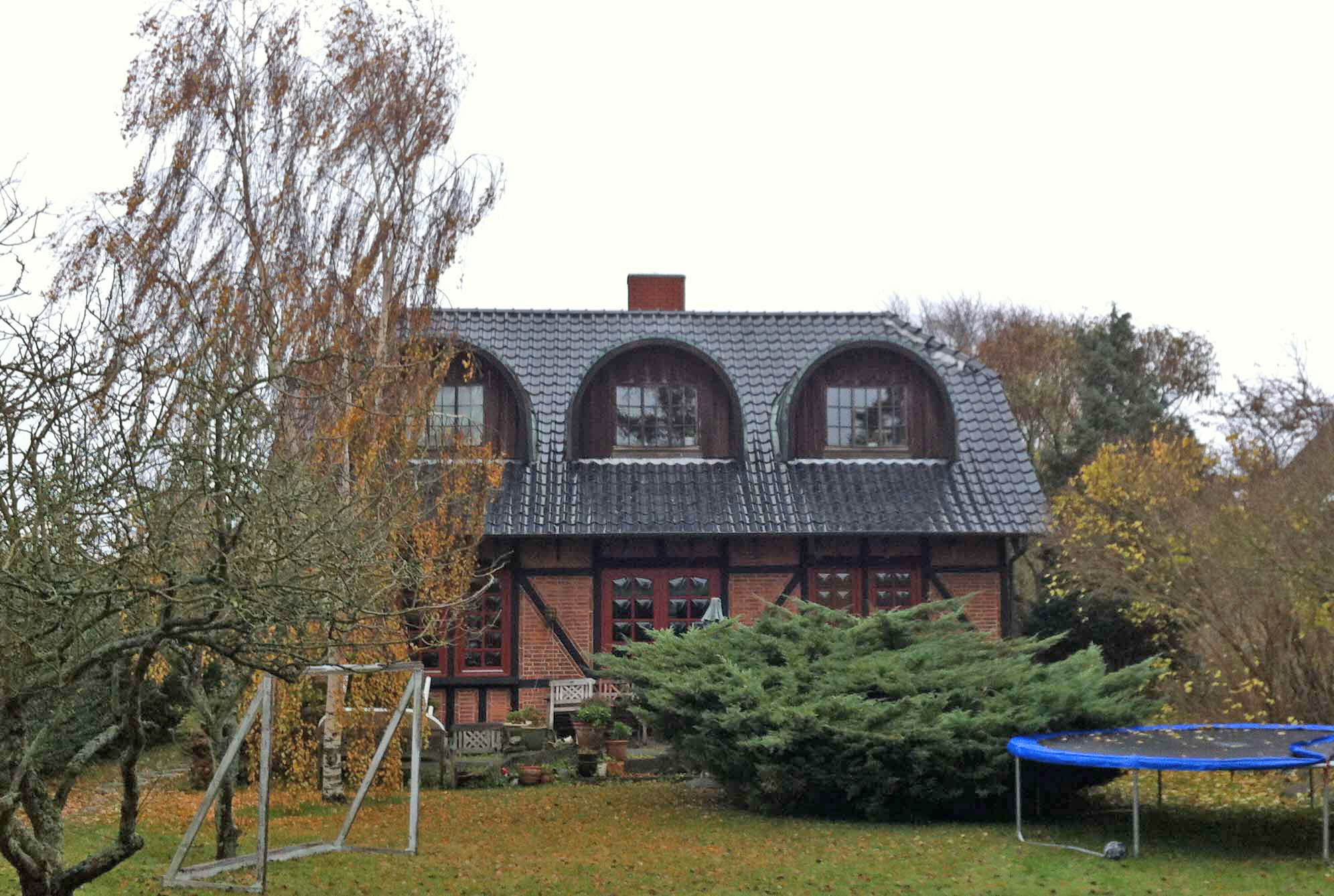 Amagerbro Station, genopført i Store Magleby